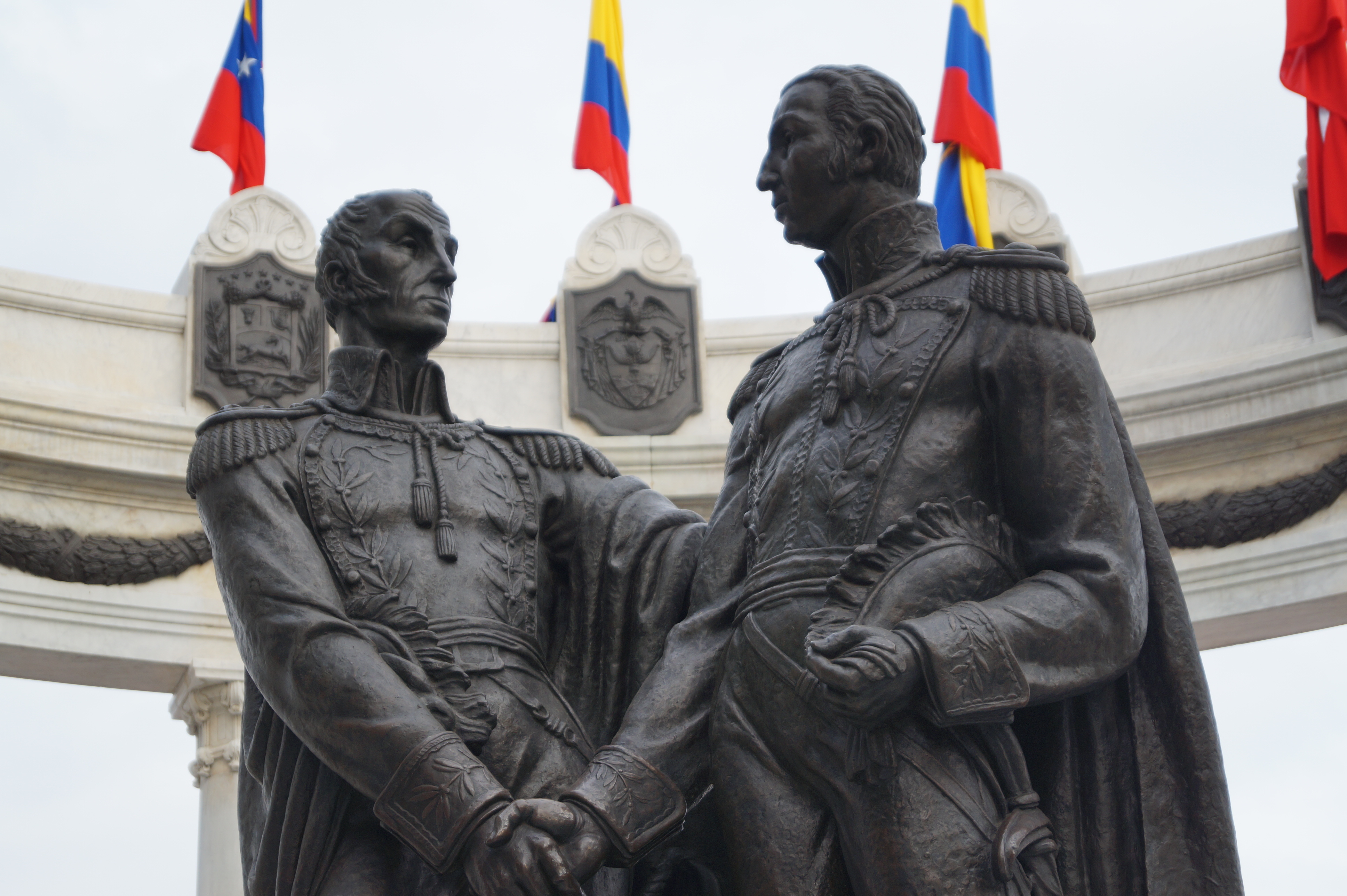 Detalle del Hemiciclo de la Rotonda, Guayaquil, Ecuador.